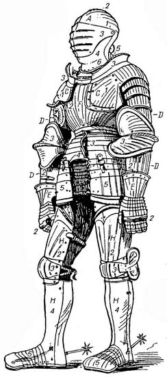 Maximilan Armour